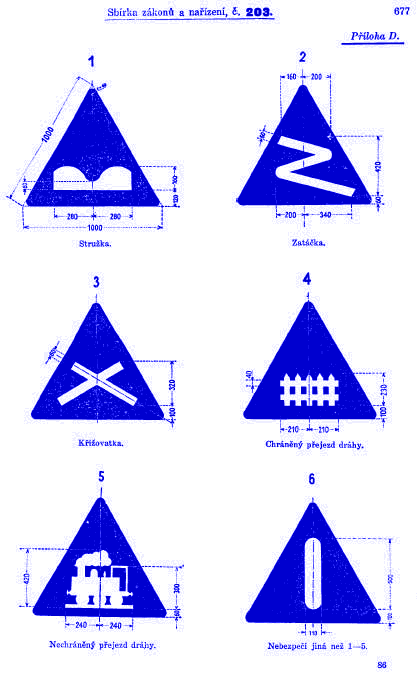 Nejstarší dopravní značky uzákoněné v Československu. Podle § 125 – 129 vládního nařízení č. 203/1935 Sb. n. a z., kterým se provádí zákon o jízdě motorovými vozidly (§ 68 zákona č. 81/1935 Sb. n. a z.), byly tyto značky provedené bíle na modrém podkladě tvaru trojúhelníku o straně 1000 mm s mírně zaokrouhlenými rohy. Měly být umisťovány po levé straně silnice ve vzdálenosti 150–250 m před nebezpečným místem, 2–2,5 m nad zemí, na červenobíle pruhovaných sloupcích.